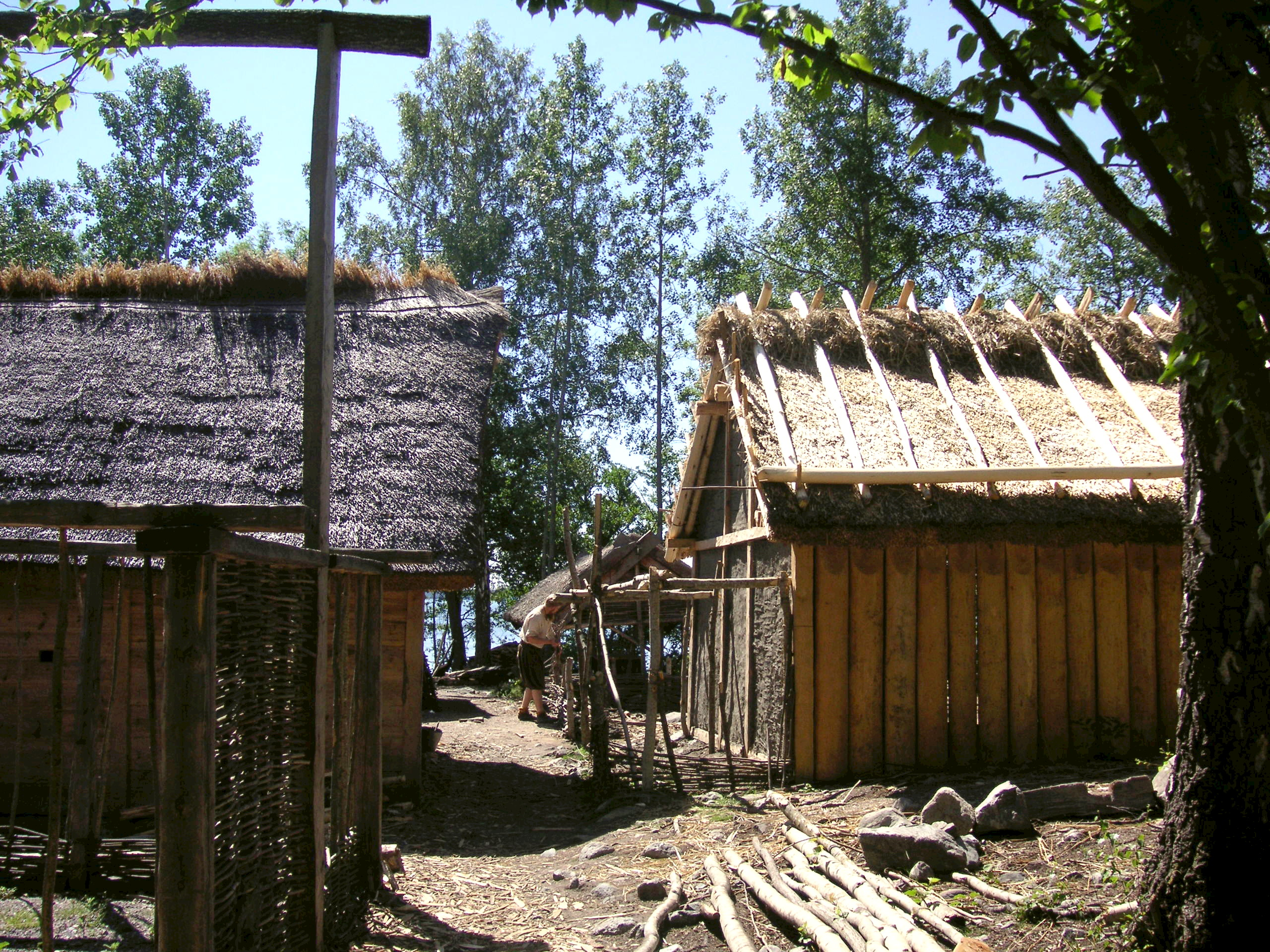 Birka, rekonstruktion av vikingahus